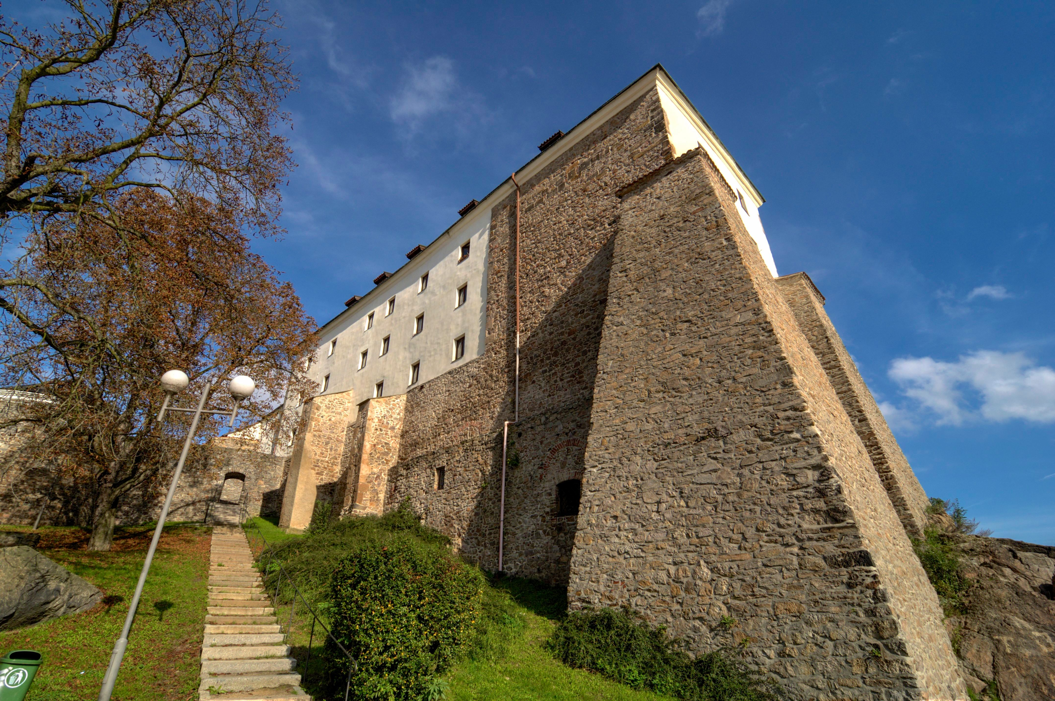 Hrad Kadaň, Tyršova 567, Kadaň.